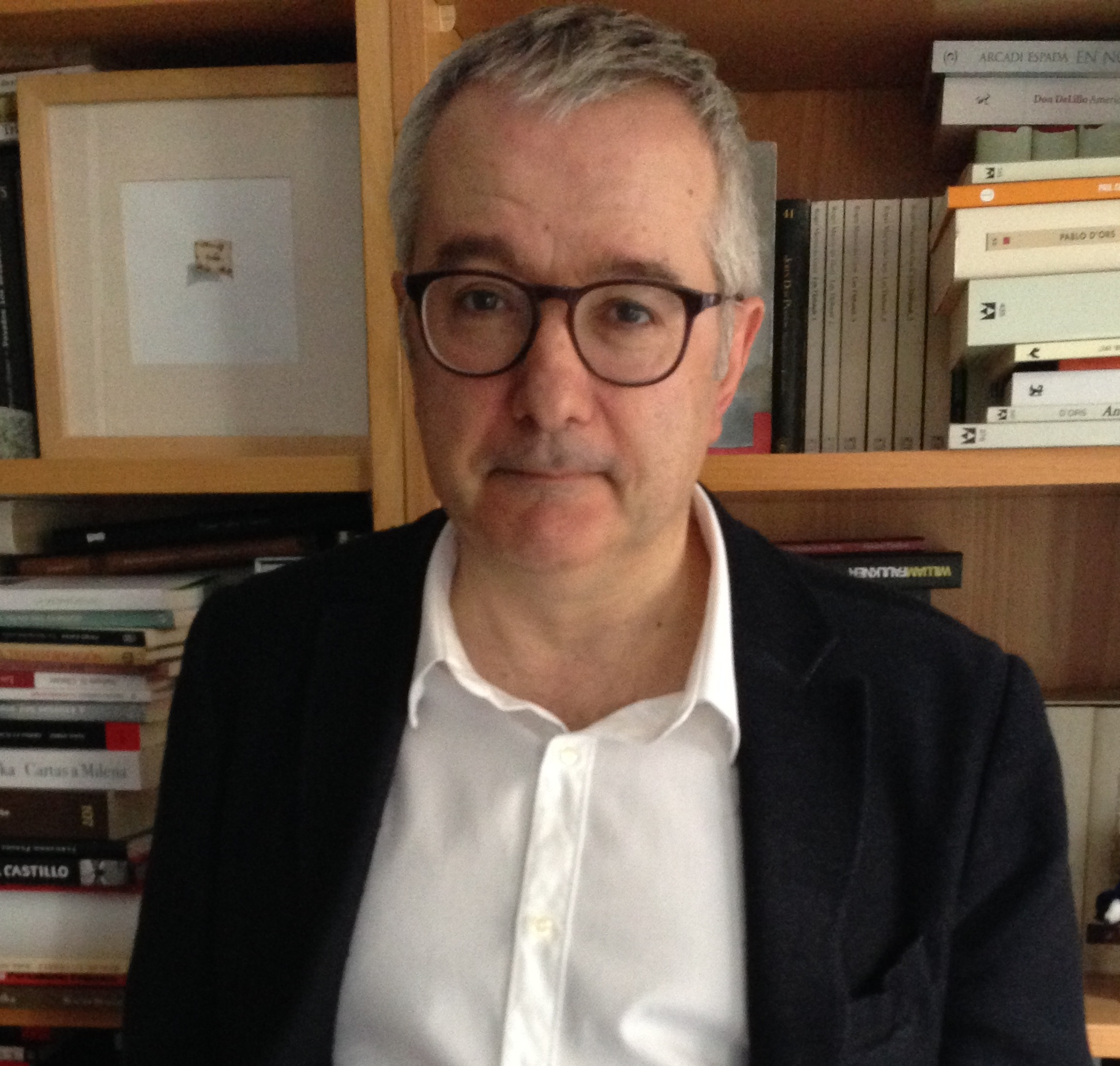 Alfonso Armada, periodista y vicepresidente de Reporteros sin Fronteras fotografiado en Madrid